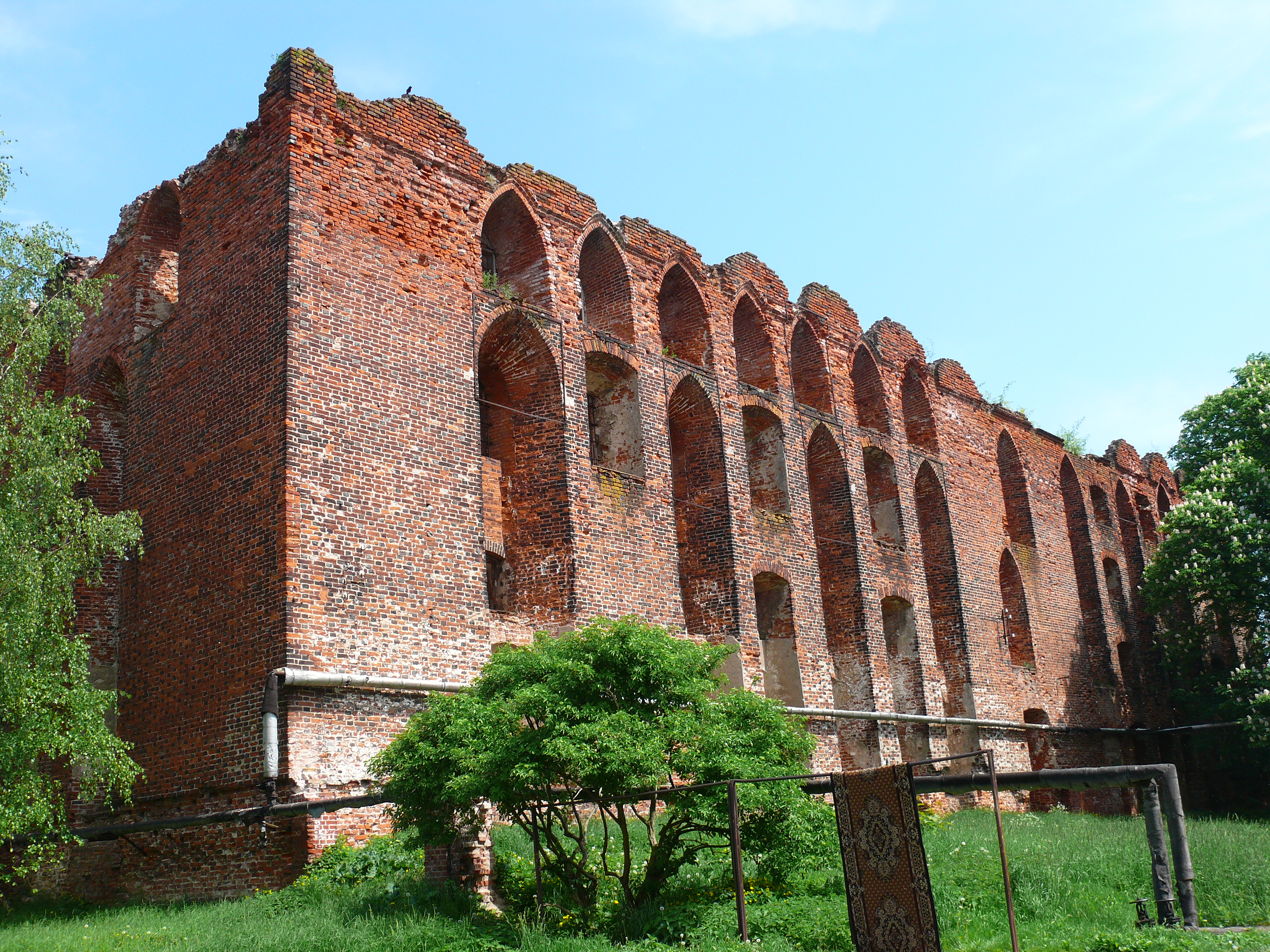 Замок Рагнит (Калиниградская область, Неман, Победы улица)